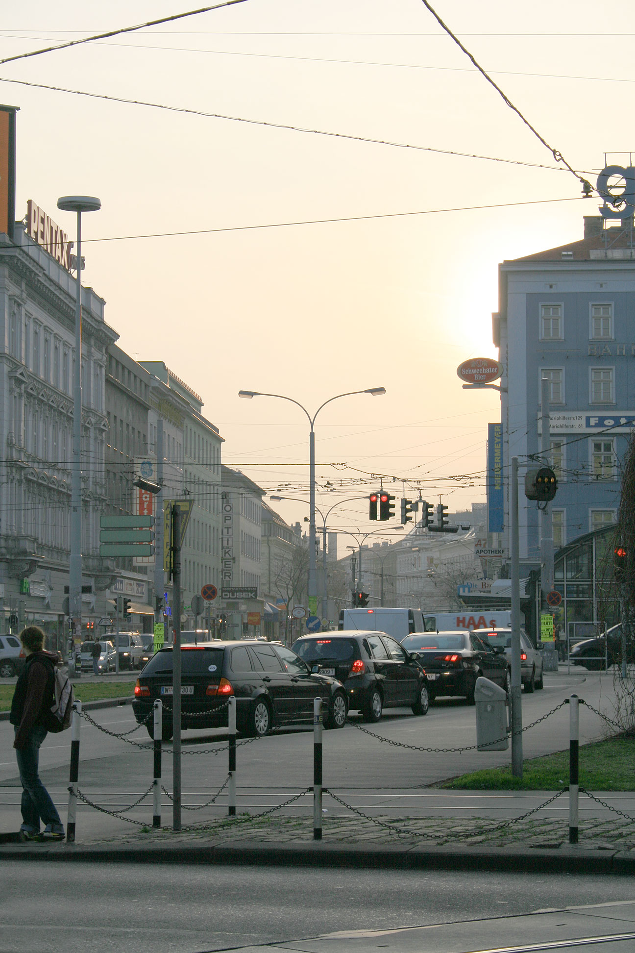 Äußere Mariahilferstraße in Wien, gesehen vom Europaplatz Mariahilferstraße in Vienna